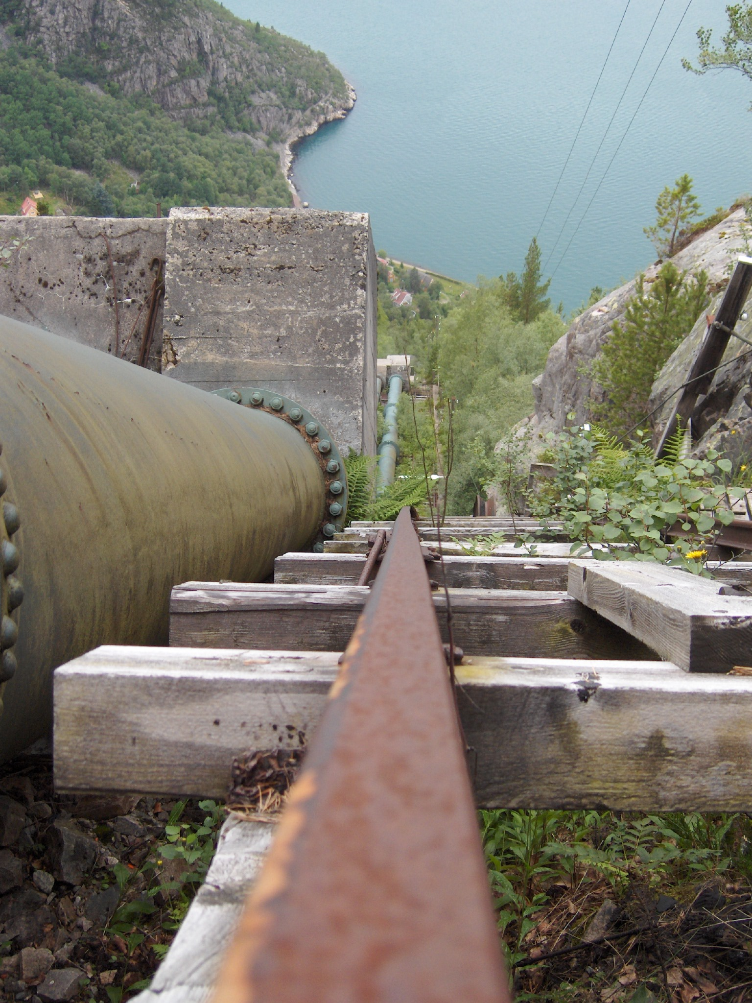 Trappene som går på siden av rørgaten opp fra Flørli kraftstasjon.